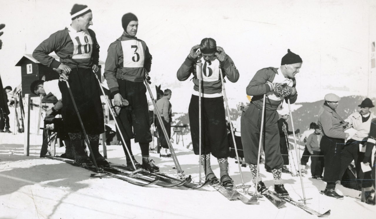 Skieurs Norvégiens aux championnats de France 1935 Andersen, Reidar Konningen, Alf Fossum, Per Ruud, Sigmund